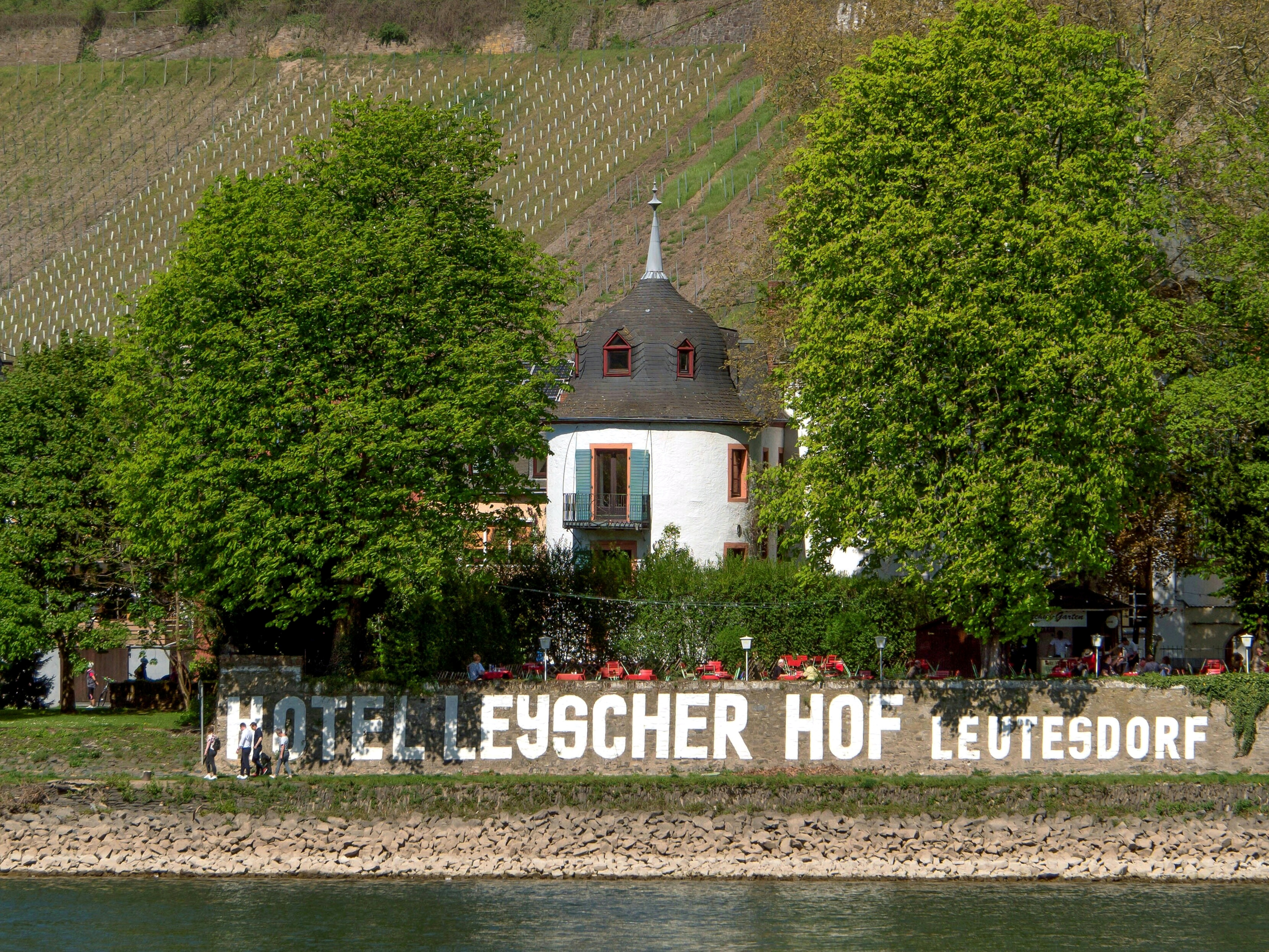 Der Rundturm des Zolltores, dem Wahrzeichen von Leutesdorf, wurde 1690 von Johann Christoph Sebastiani, dem kurtrierischen Hofbaumeiser, in barocker Stilform umgestaltet.